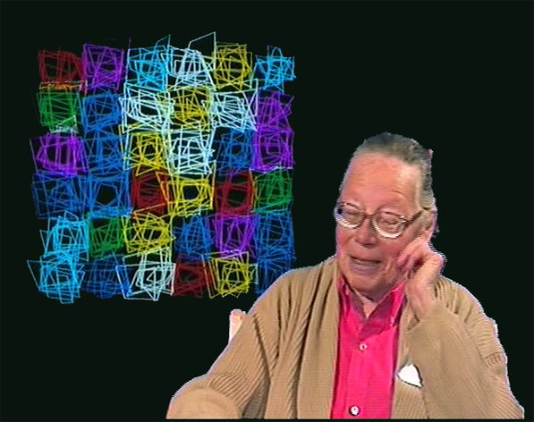 Portrait de Vera Molnár